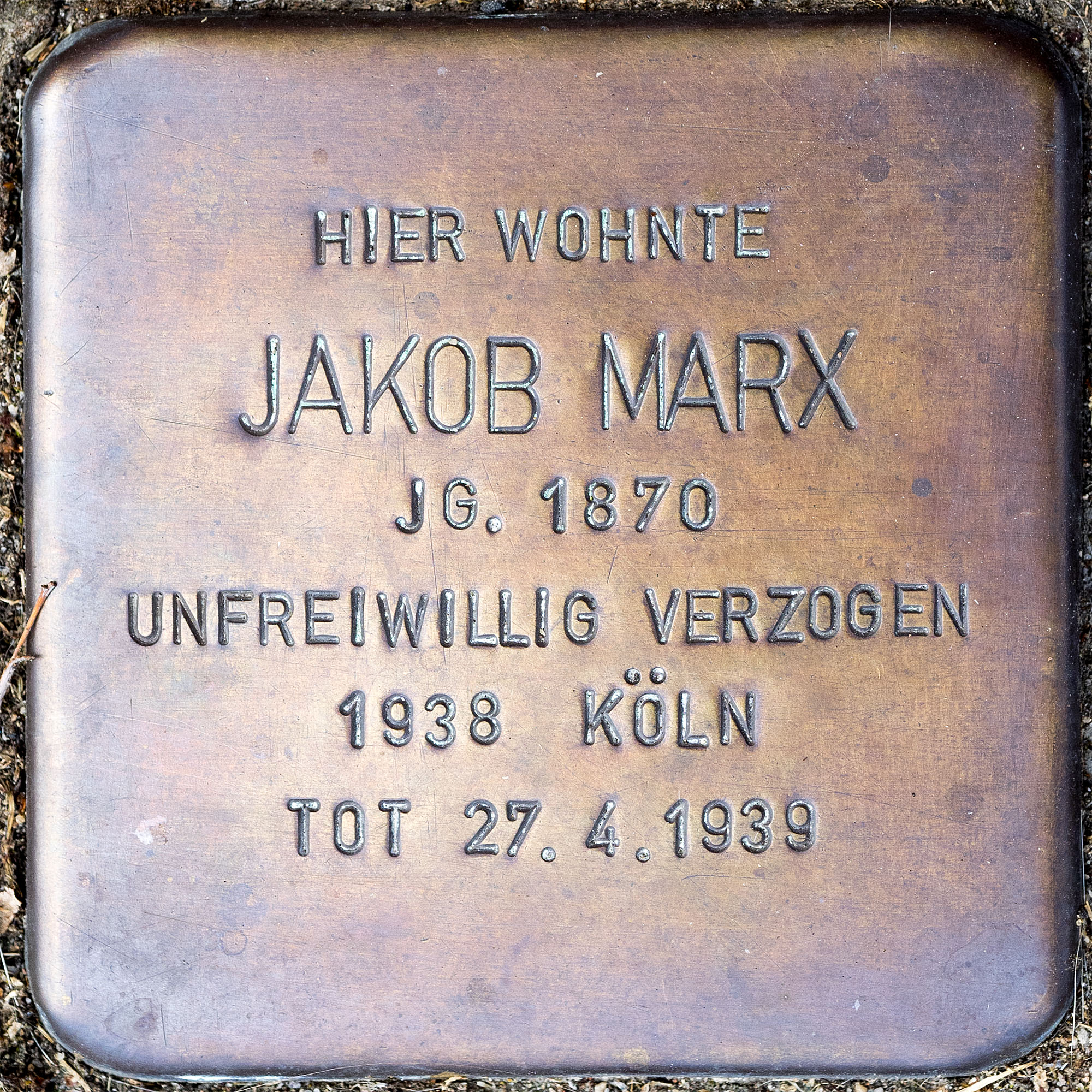 Stolpersteine Roki: Marx, Jakob